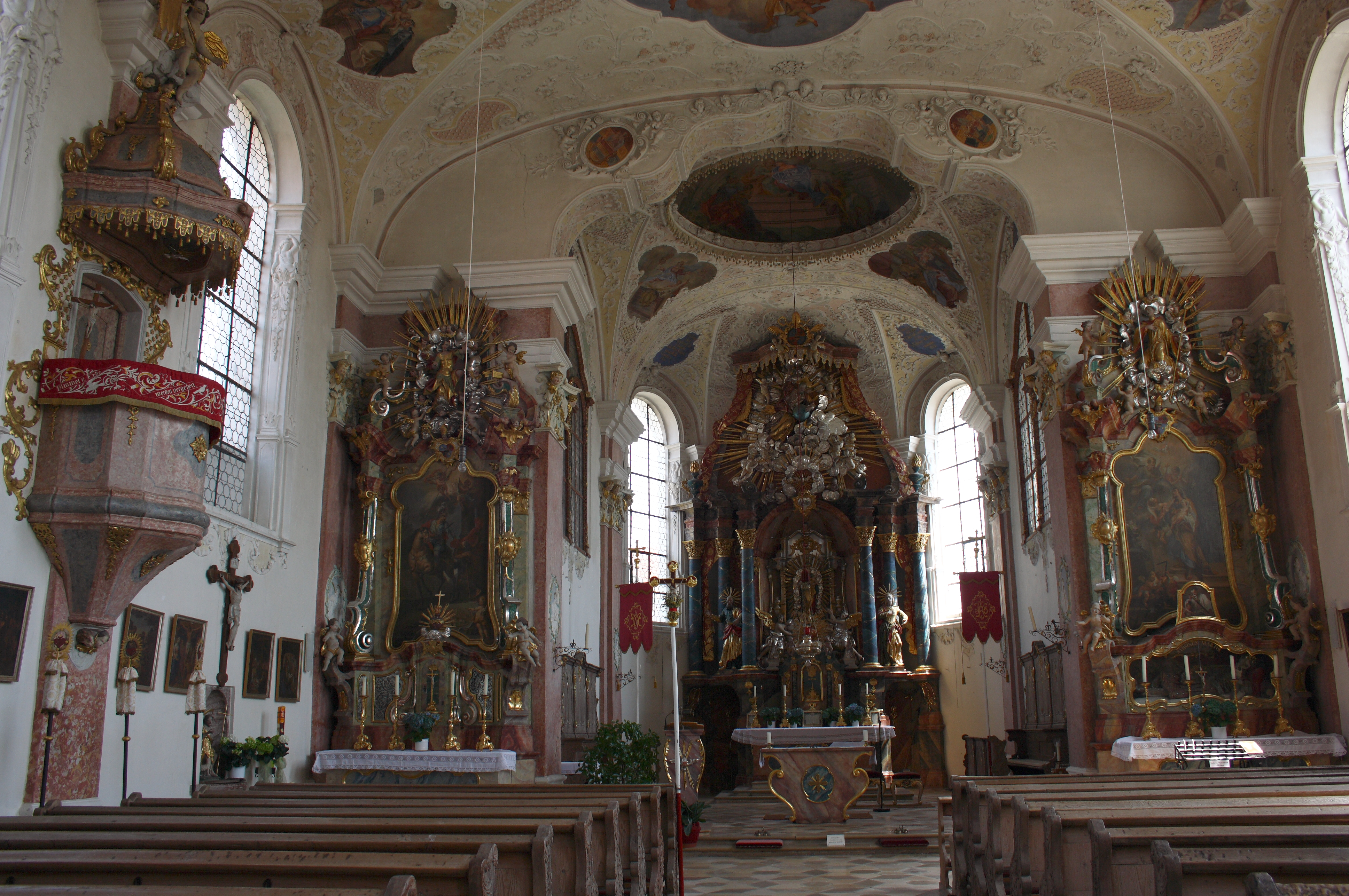 Katholische Pfarrkirche St. Martin in Deubach, einem Stadtteil von Ichenhausen im Landkreis Günzburg (Bayern), 1739/40 von Johann Martin Kraemer errichtet, Innenraum mit Blick zum Chor